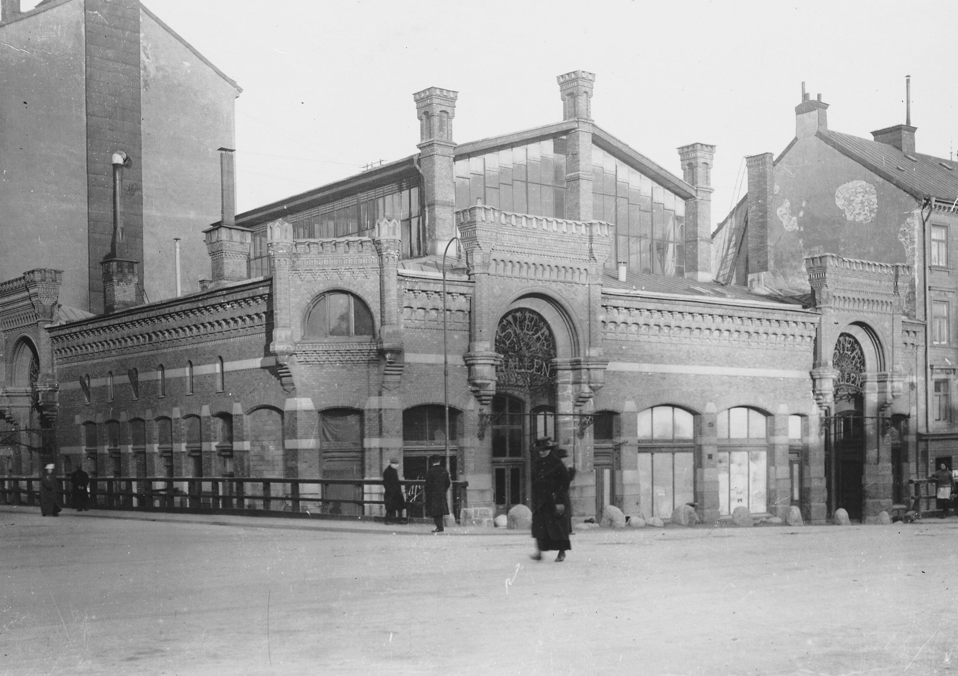 Saluhallen Sveahallen vid Sveavägen i Stockholm, arkitekt Ernst Haegglund